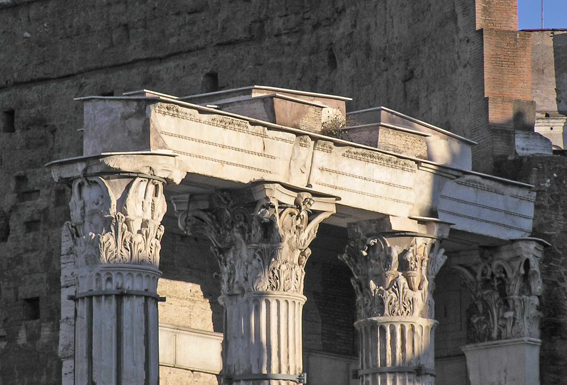 Italia, Roma, Fori Imperiali, Foro di Augusto, Tempio di Marte Ultore (2 a.C.), particolare dell'architrave sopra le colonne del fianco destro del tempio, rimaste in situ.